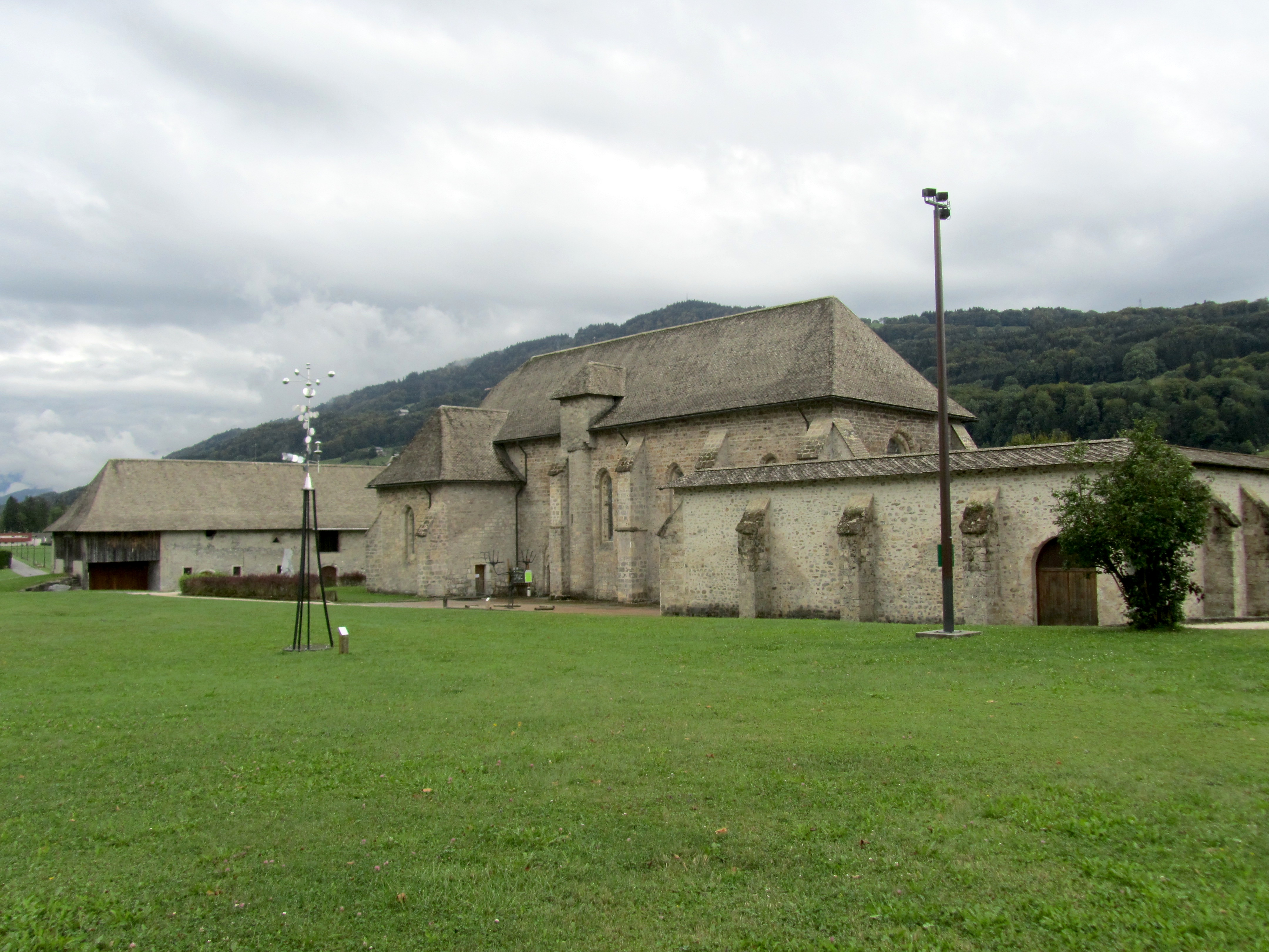 la Chartreuse de Mélan, une abbaye de Taninges